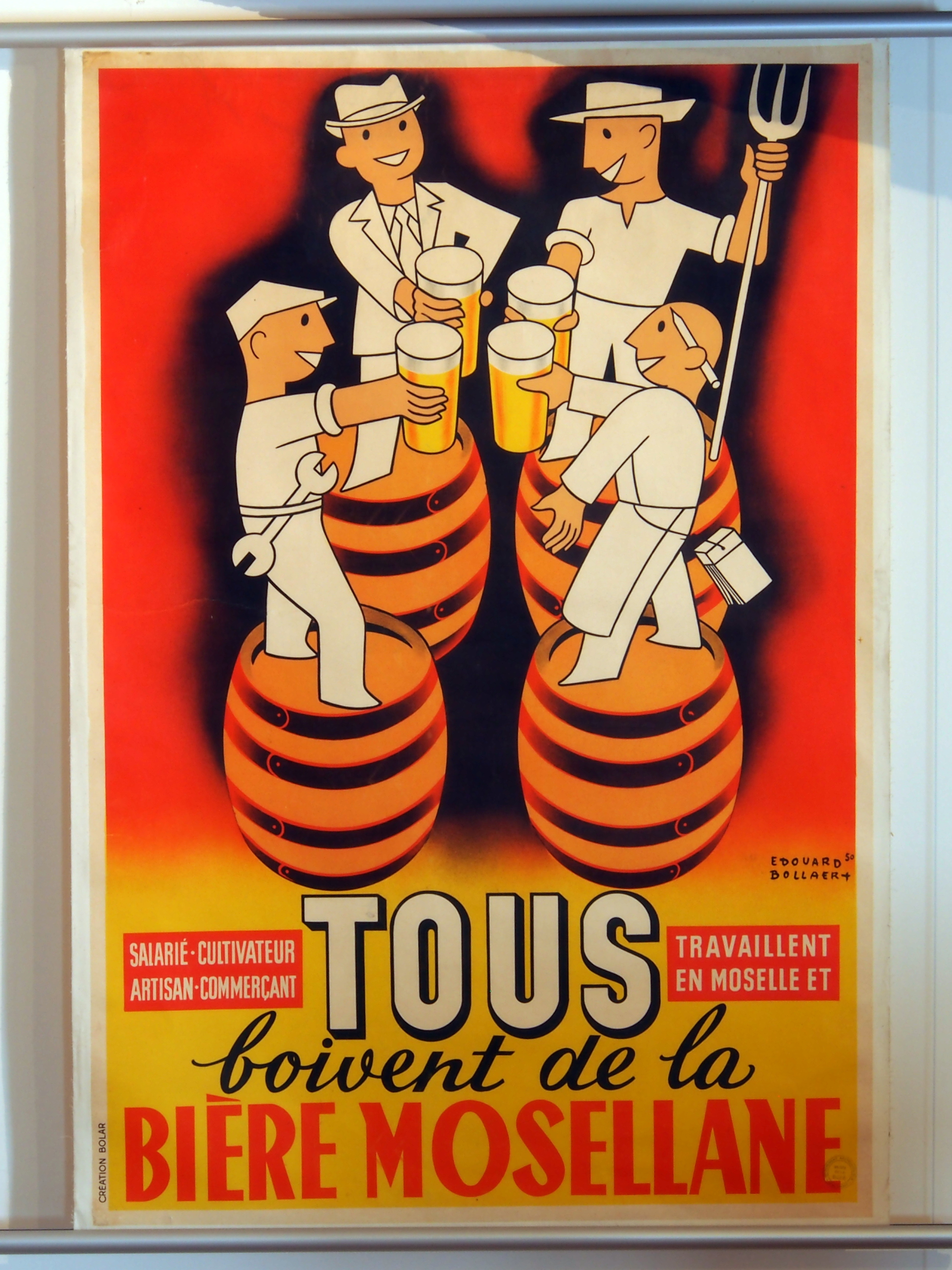 tous boivent de la Bière mosellane